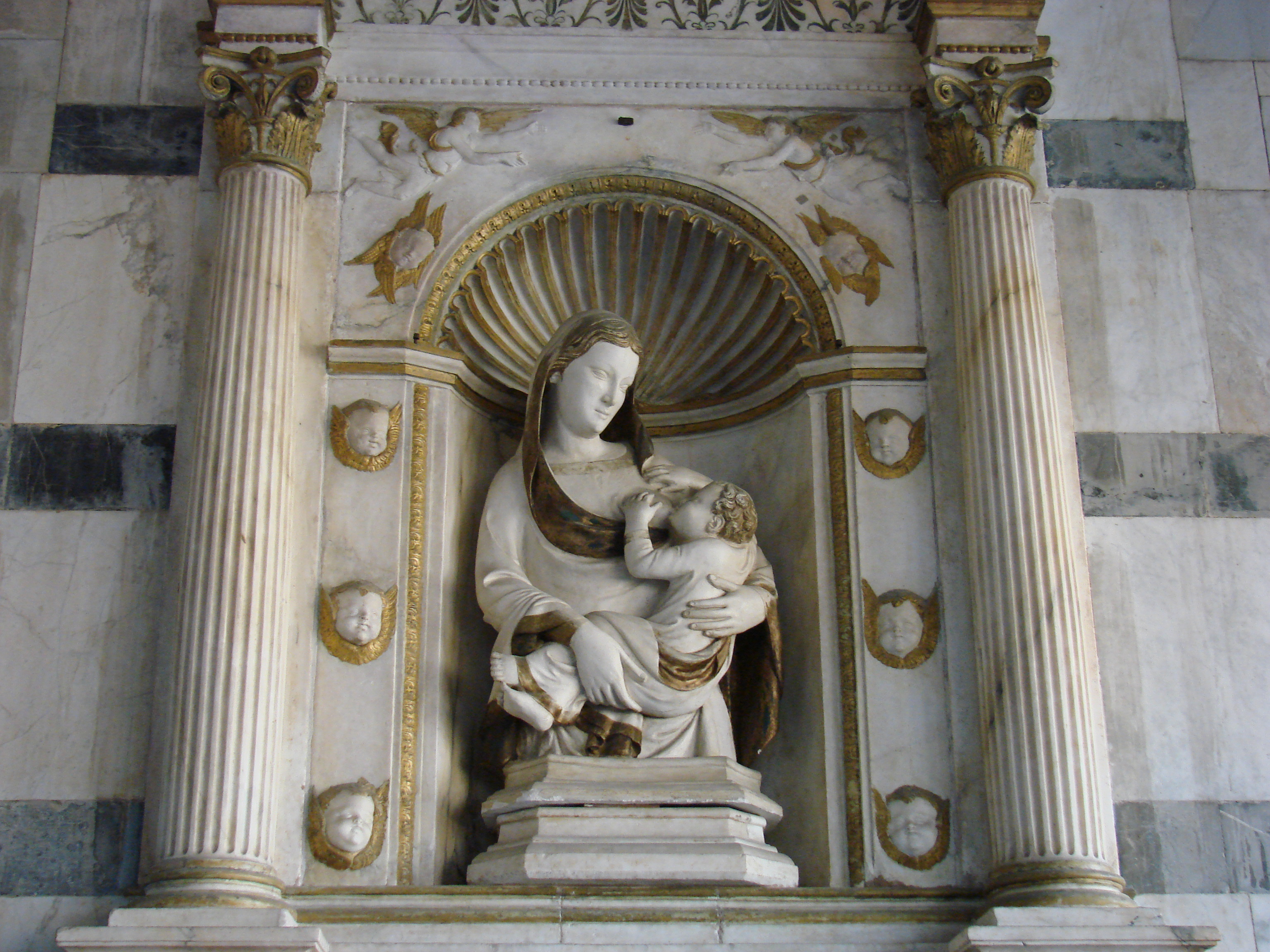 Andrea Pisano, Madonna del Latte, copia, Marmo. Chiesa della Spina, Pisa